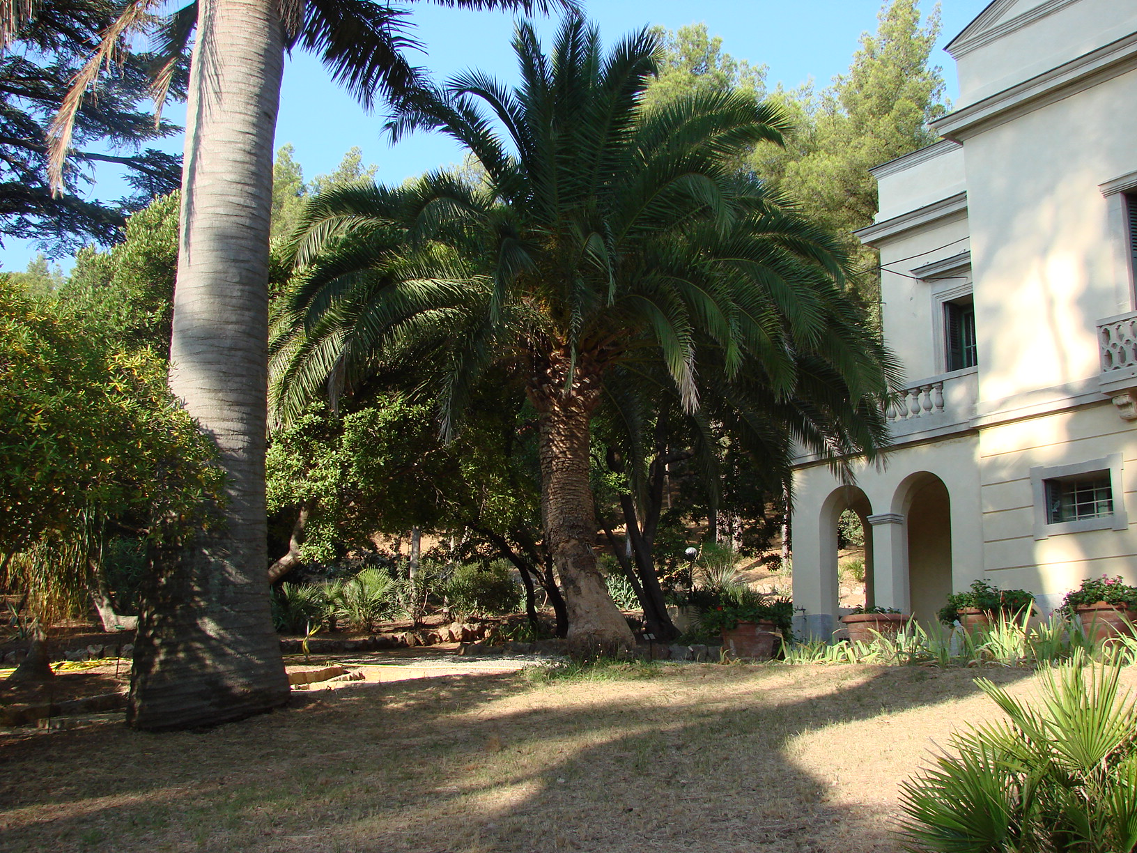 Le Plantier